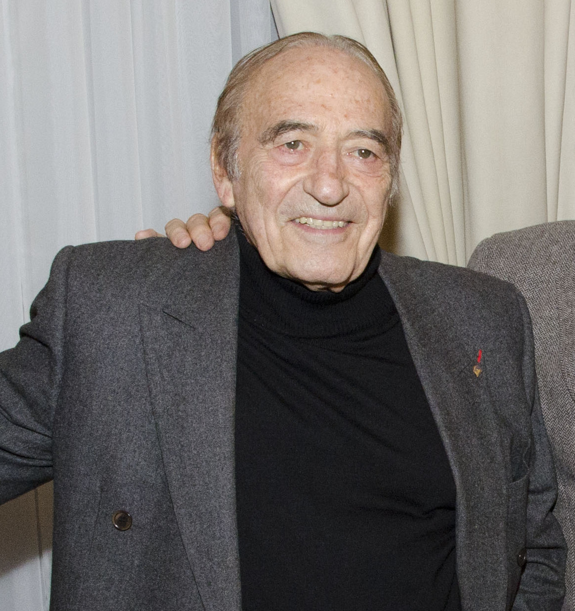 Painter Antonio Seguí, pianist Miguel Angel Estrella, folk musician Raúl Barboza, sculptor Julio Le Parc, and National Director for the Arts José Luis Castiñeira de Dios together at the 2014 Paris Book Fair. Photo: Augusto Starita / Secretaría de Cultura de la Presidencia de la Nación